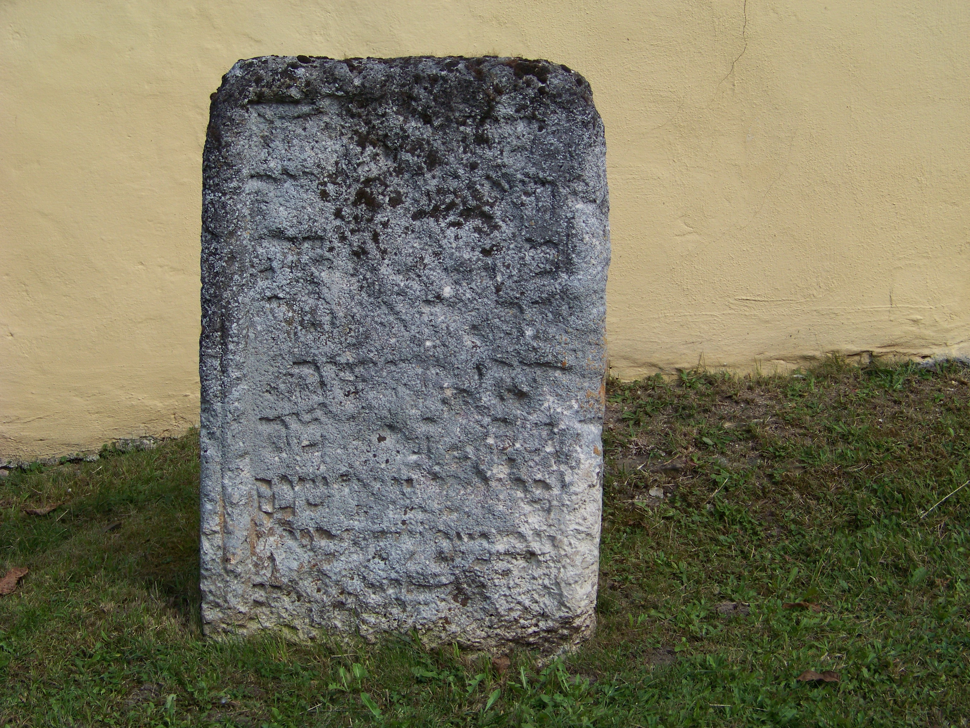 Mintraching, Mangolding, Kirchstraße. Jüdischer Grabstein. Kalkstein, mittelalterlich; 1519 aus Regensburg hierher verschleppt.